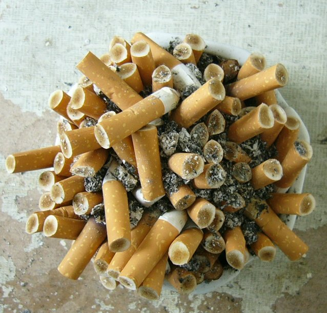 von mir fotografiert